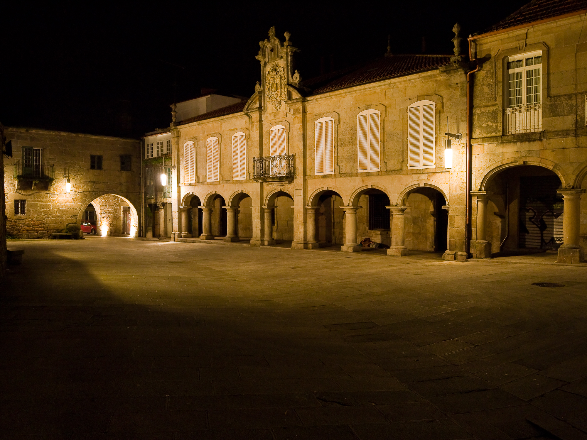 Pazo de Mugartegui - Praza da Pedreira - Pontevedra